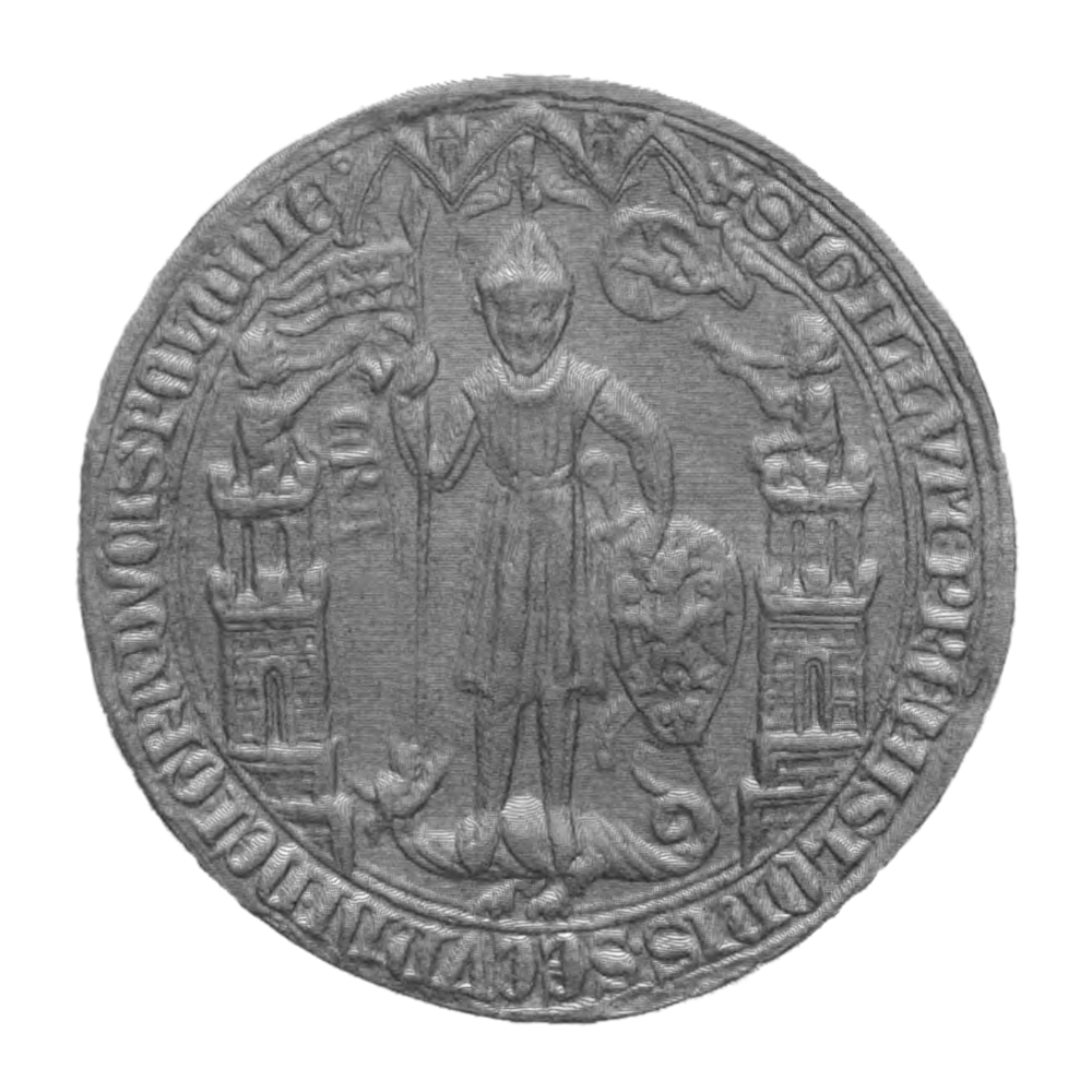 Przemysł II., Herzog von Polen und Pommerellen, von ihm in mehreren preußischen Urkunden benutzes Siegel; das abgebildete Siegel stammt von einer Urkunde, die im Stadtarchiv von Elbing aufbewahrt wurde.